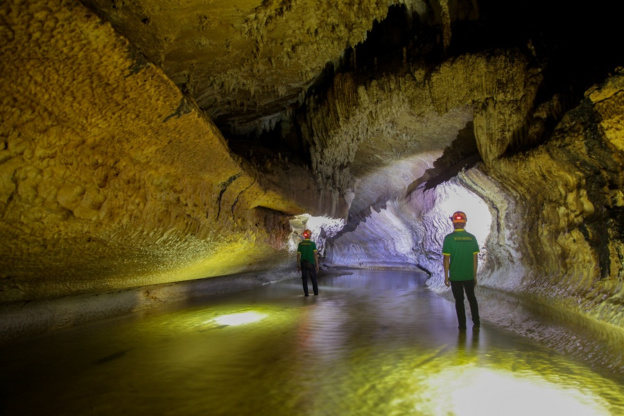 Hua ma cave